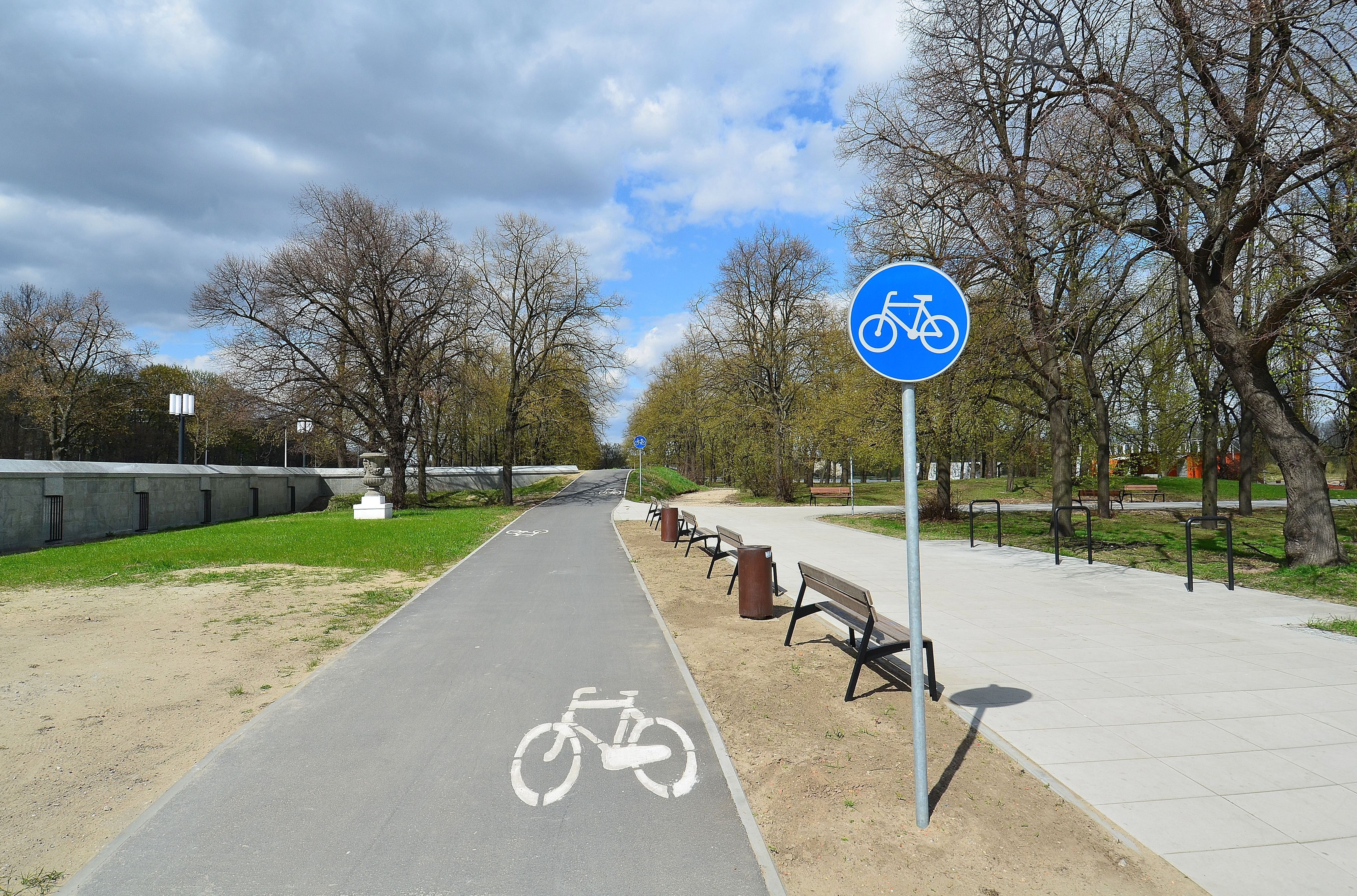 Droga dla rowerów wzdłuż ulicy Solec w Warszawie